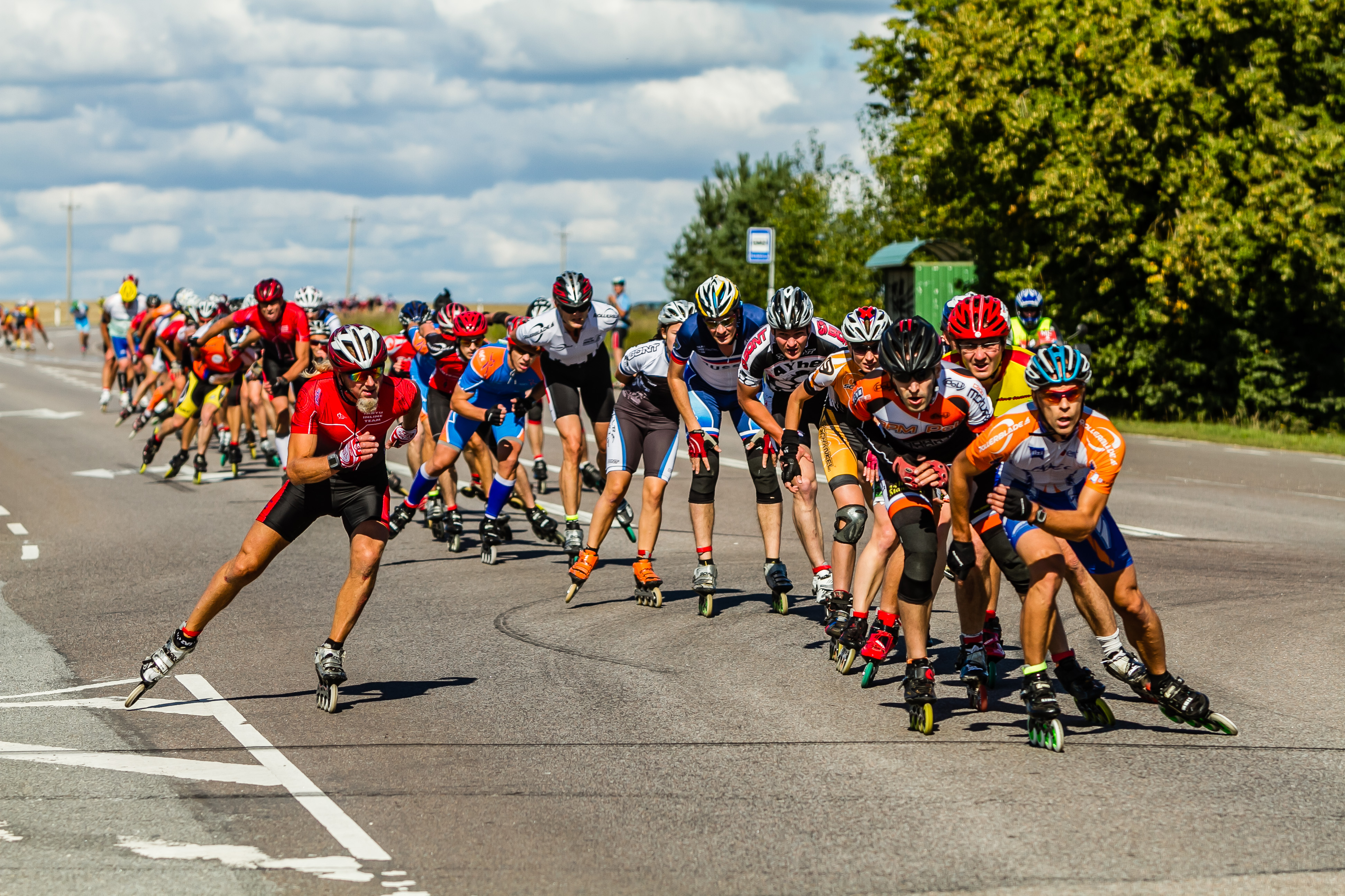 Tartu Rulluisumaraton